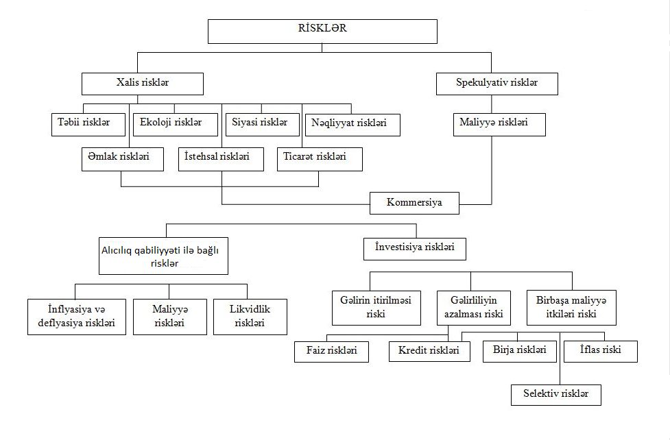 Risklərin növləri